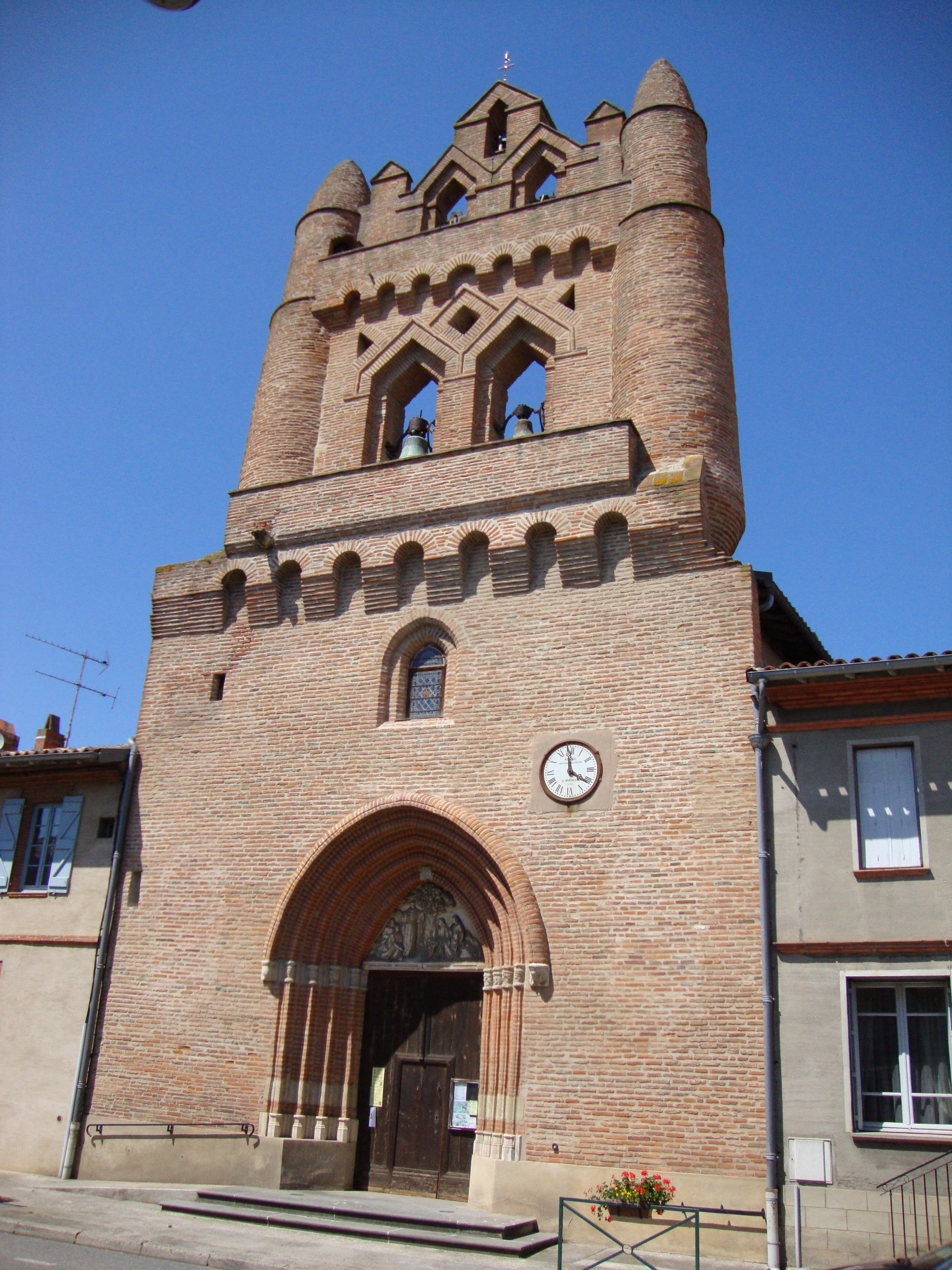 Villenouvelle (Haute-Garonne, Fr) église de style toulousain. .